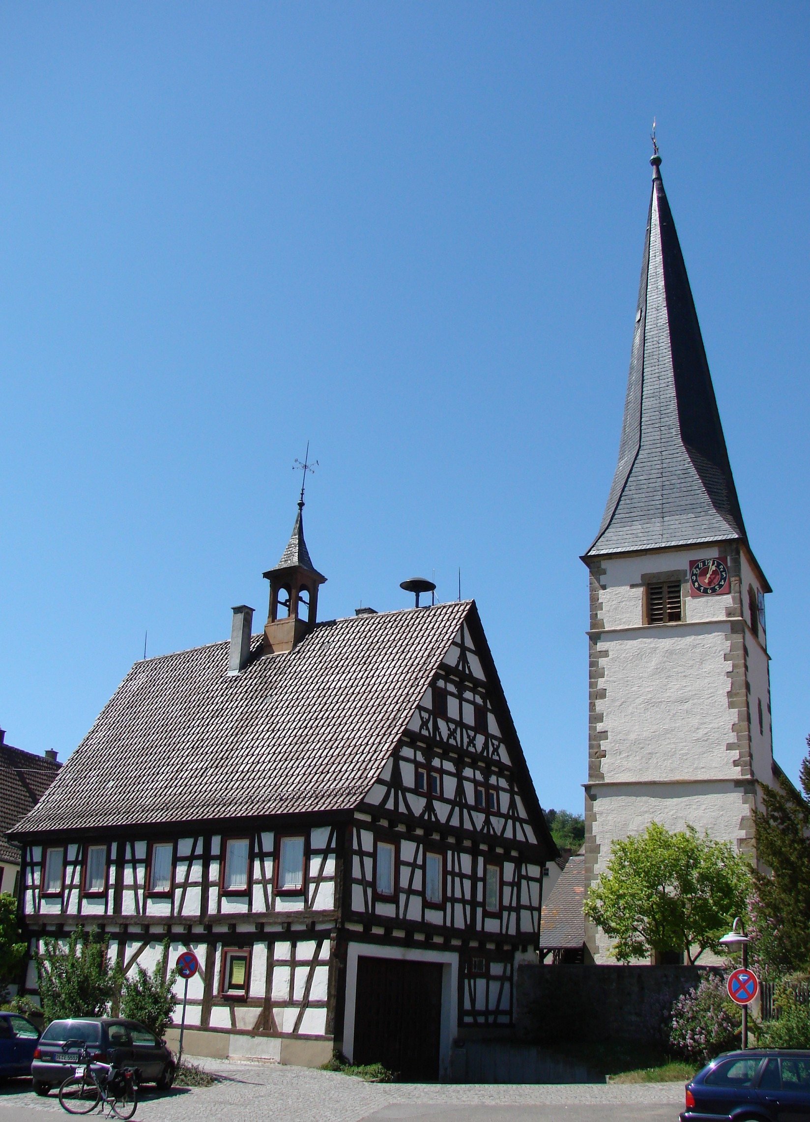 Mühlacker, in the village of Mühlhausen